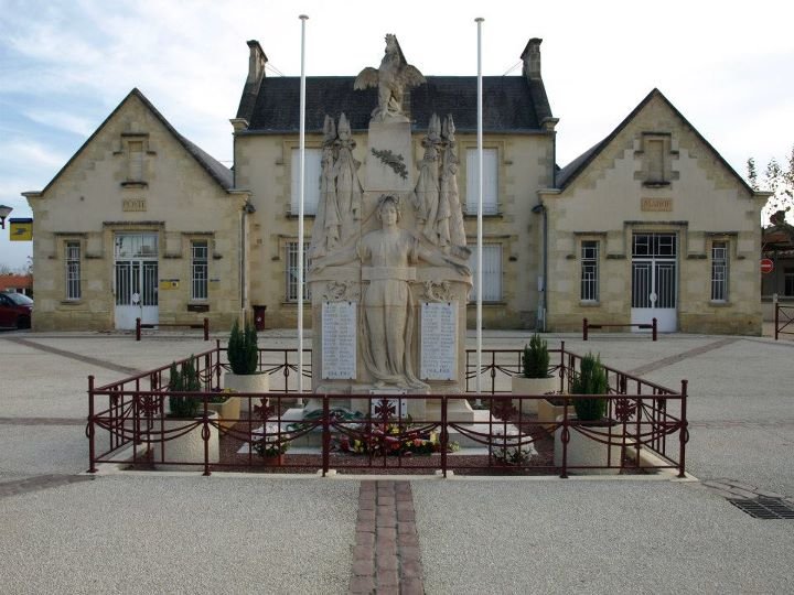 PUGNAC, Gironde, France, Mairie et monuments aux morts